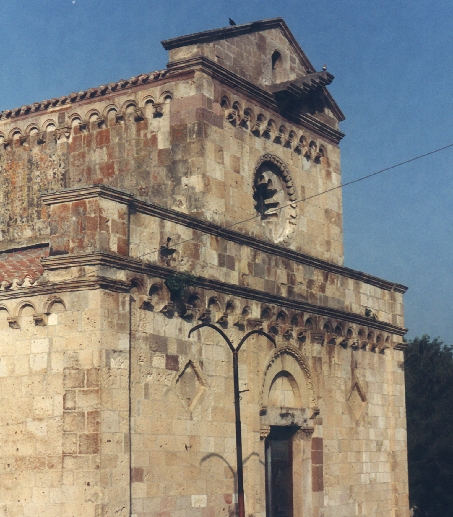 Chiesa romanica di Santa Maria a Tratalias (Carbonia-Iglesias)